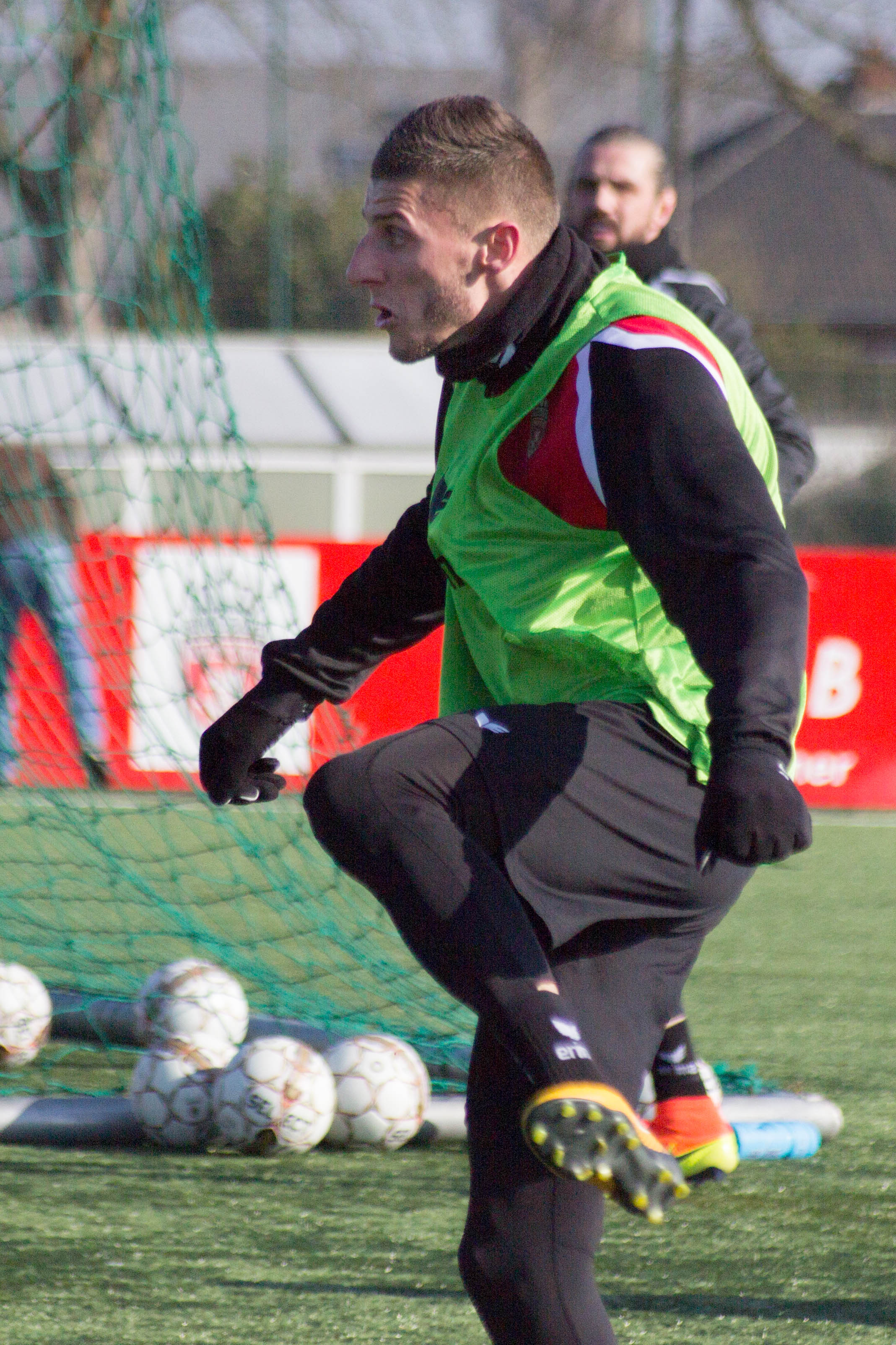 Entrainement du Royal Excel Mouscron, Futurosport, Mouscron. Le 22 Février 2018.